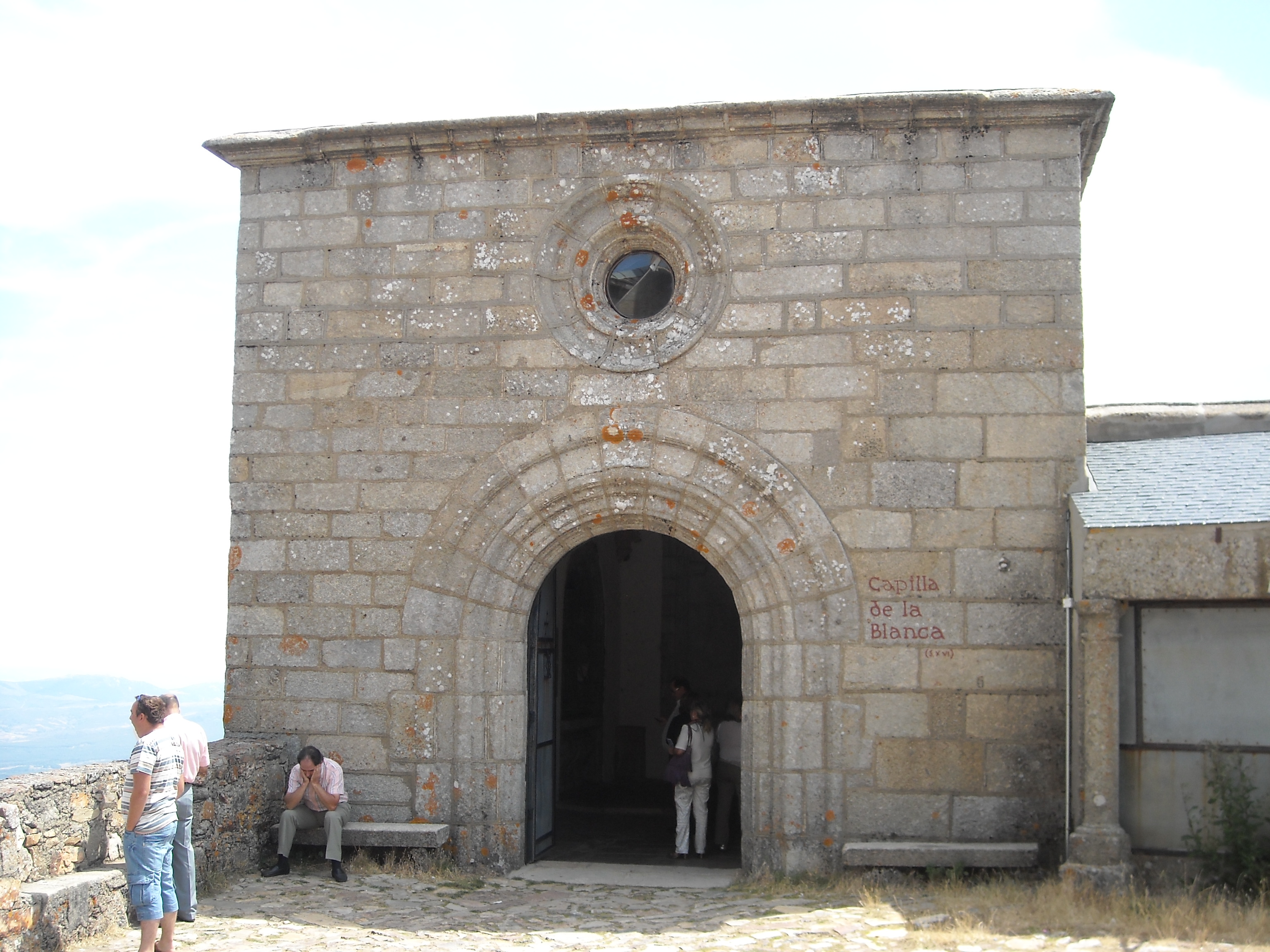 Capilla de la Blanca, Santuario de Nuestra Señora de la Peña de Francia, El Cabaco, Salamanca, España